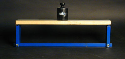 Stahlsandwichelement aus dem Bauwesen.